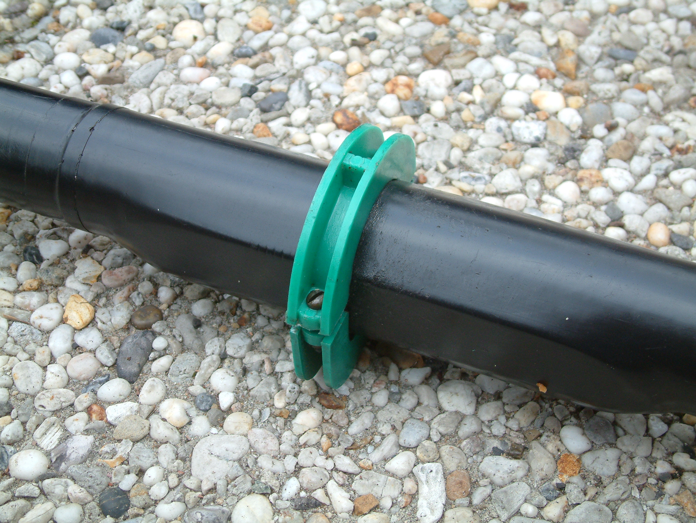 Verstelbaar manchet van een roeiriem Categorie:Roeien